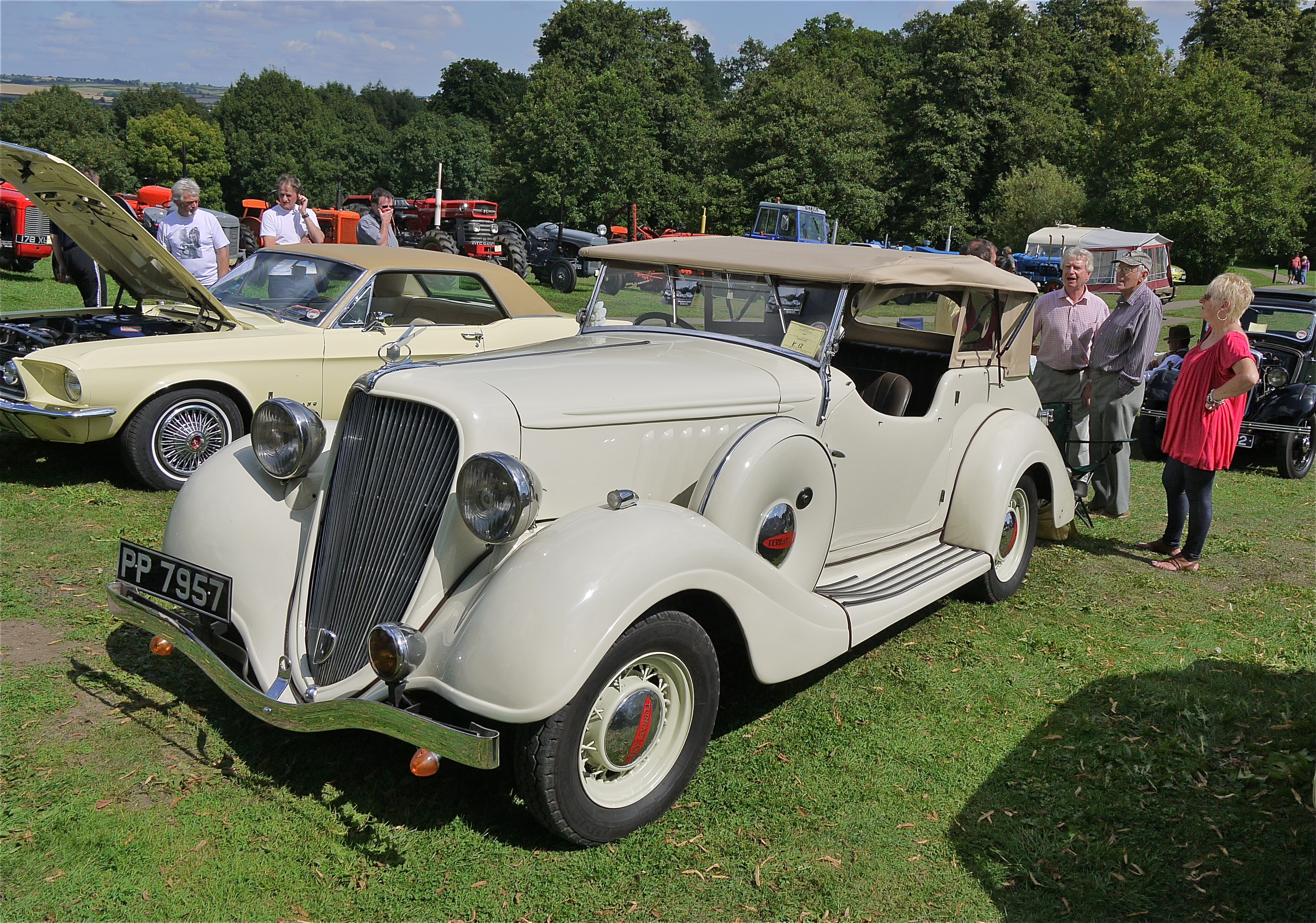 Panasonic G1 14-45 Lens